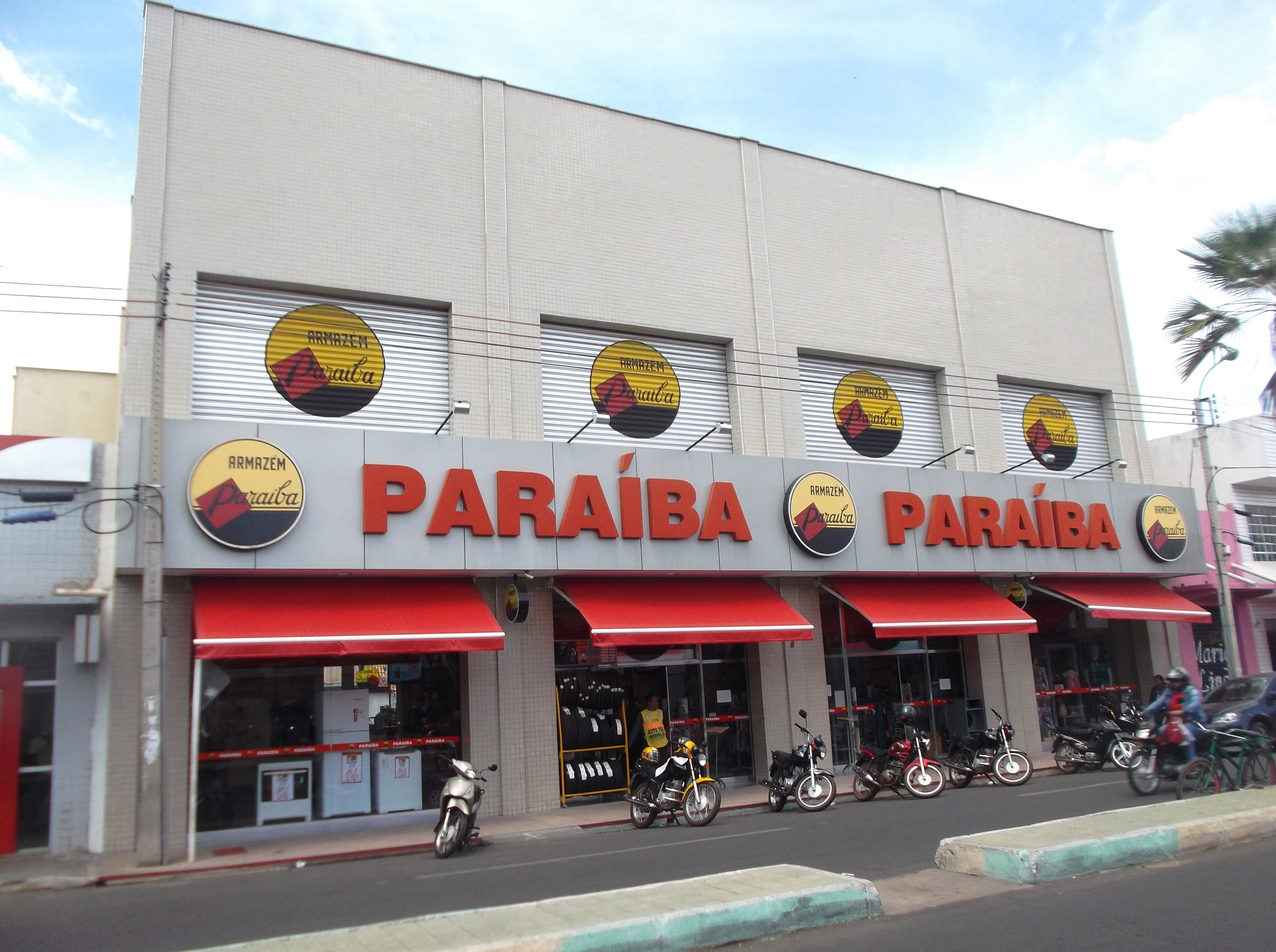 Imagem do edifício do Armazém Paraíba e Campo Maior-Piauí.